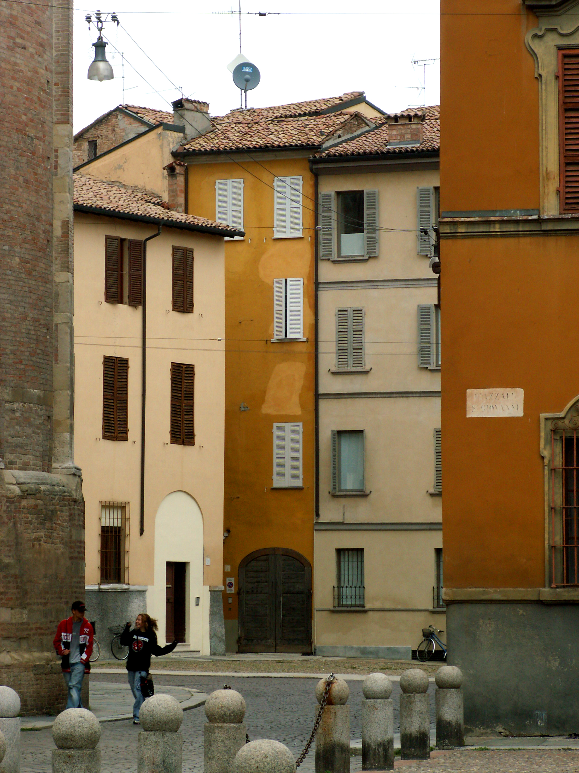 Parma, Italia